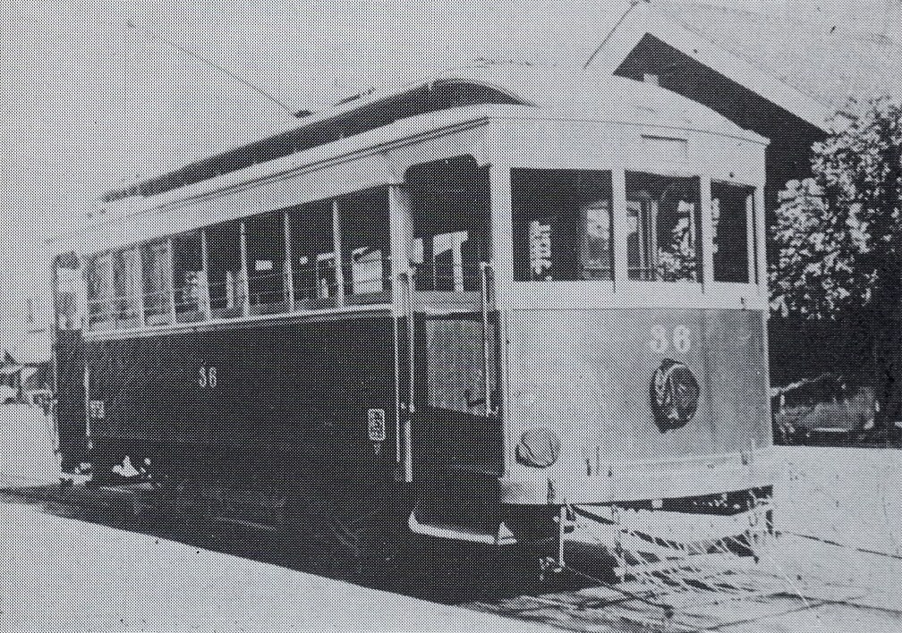 名鉄36号。戦災で焼失し、戦後モ50形として車体を新製する。